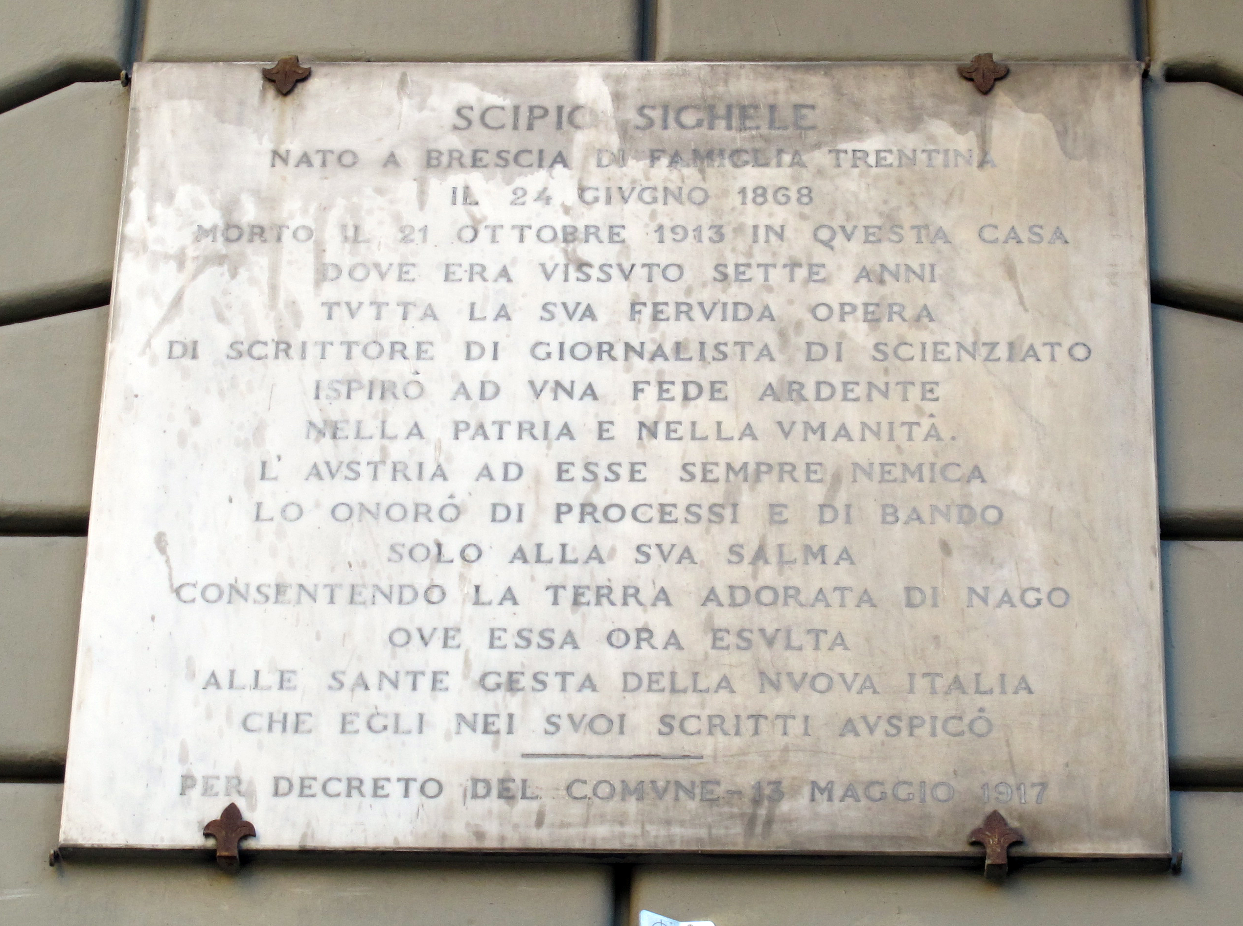 Via enrico poggi, targa scipio sighele